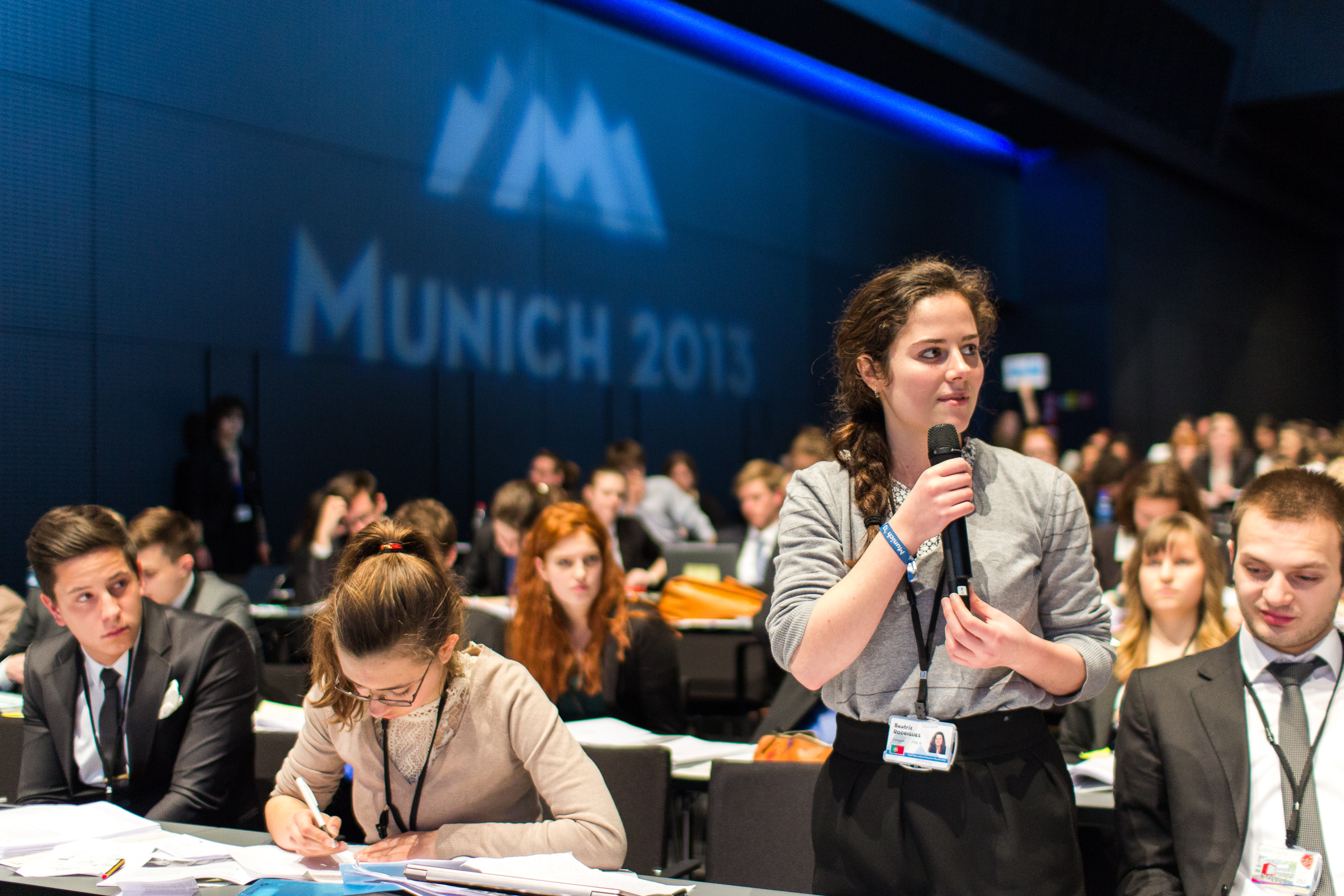 GA of the 72nd IS of the European Youth Parliament